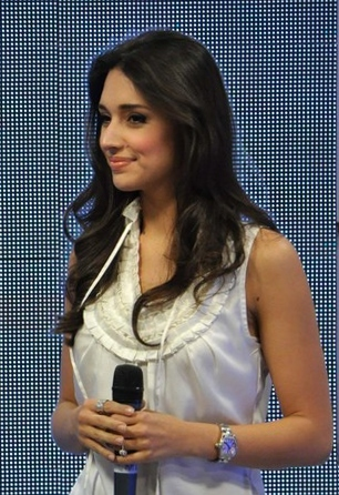 La Miss Universo 2003 Amelia Vega.